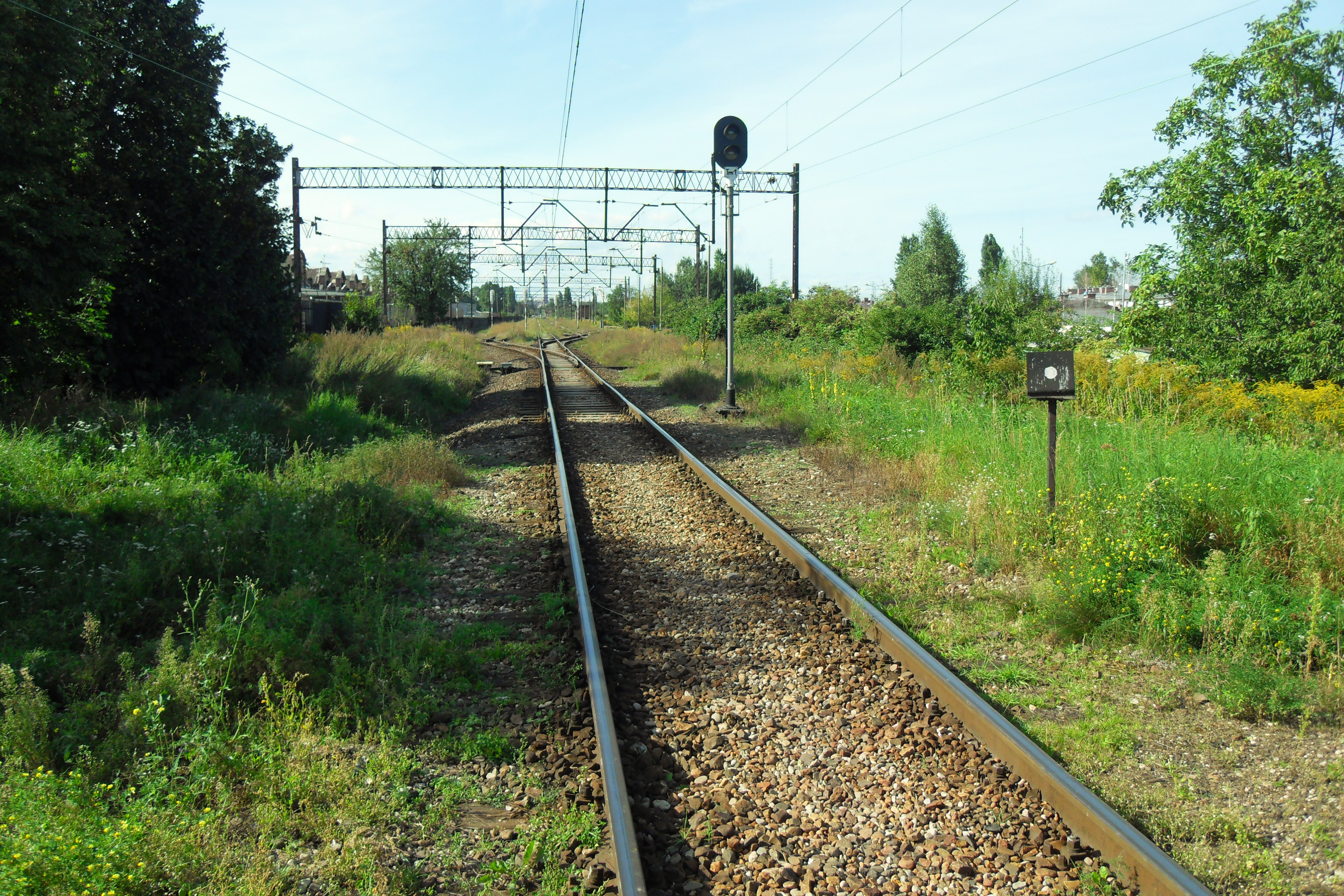 Gdańsk Przeróbka, tor kolejowy (łącznica nr 965) wzdłuż ogrodzenia Zakładów Naprawczych Taboru Kolejowego (widok w kierunku północno-zachodnim).